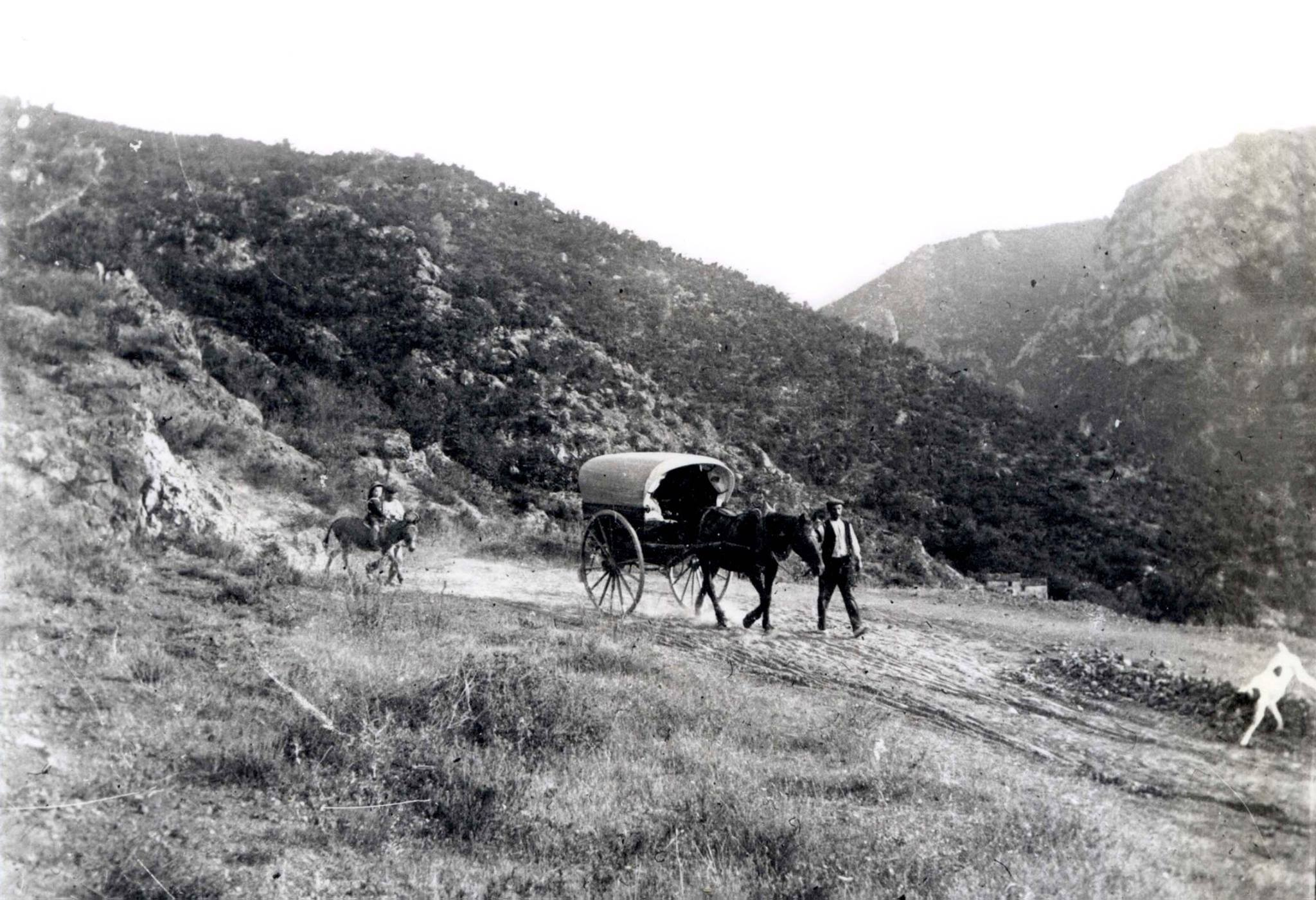 Tartane dans les Pyrénées-Orientales (France).